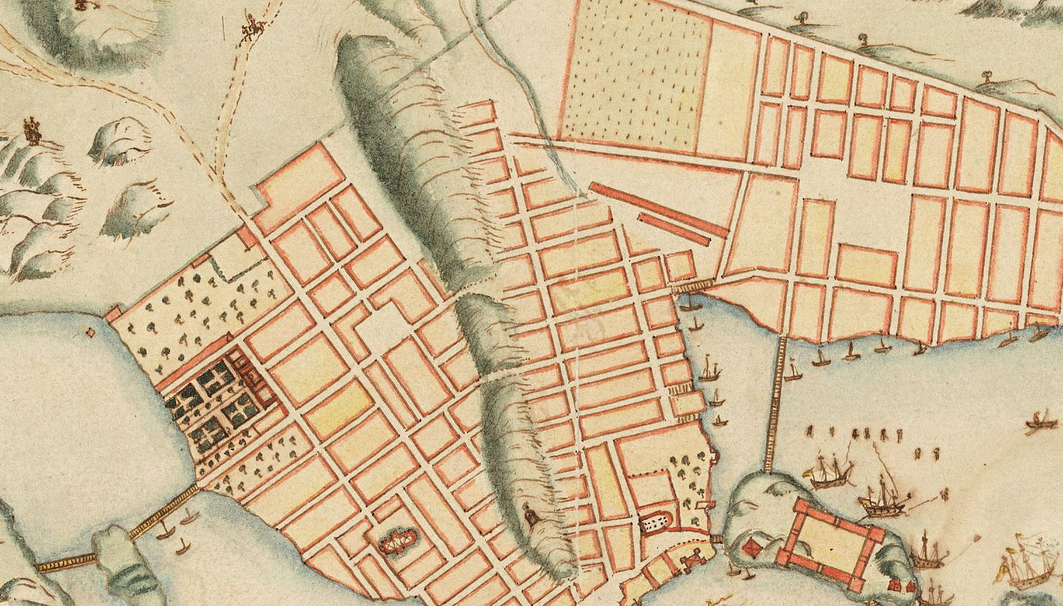 Del av karta över hela Stockholm, med Brunkebergsåsen på Norrmalm